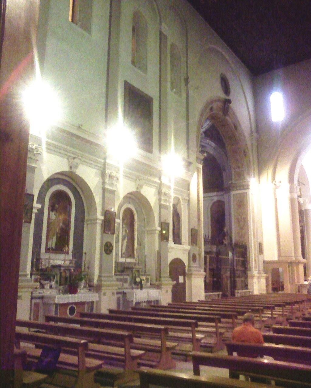 Chiesa Maria Santissima Annunziata - Modugno (Bari) - Italy